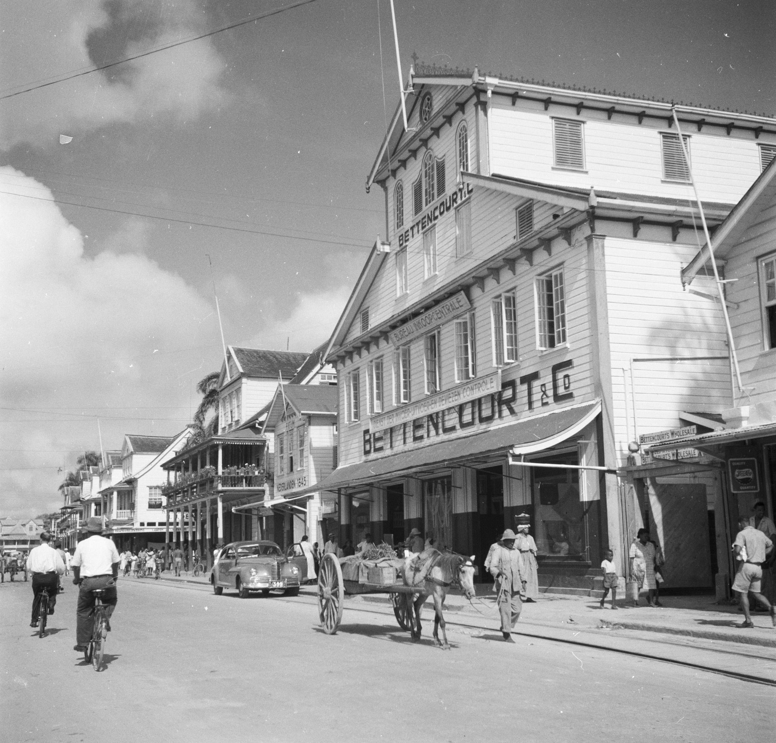 Collectie / Archief : Fotocollectie Van de Poll Reportage / Serie : Reis naar Suriname en de Nederlandse Antillen Beschrijving : De Waterkant in Paramaribo met de winkel van Bettencourt en Co. Annotatie : In de winkel werden kruidenierswaren, gereedschappen en ook auto's verkocht. In het pand werd later de Dienst der In- en Uitvoer gevestigd Datum : 1947 Locatie : Paramaribo, Suriname Trefwoorden : straatbeelden, winkels Fotograaf : Poll, Willem van de, [onbekend] Auteursrechthebbende : Nationaal Archief Materiaalsoort : Negatief (zwart/wit) Nummer archiefinventaris : bekijk toegang 2.24.14.02 Bestanddeelnummer : 252-6183